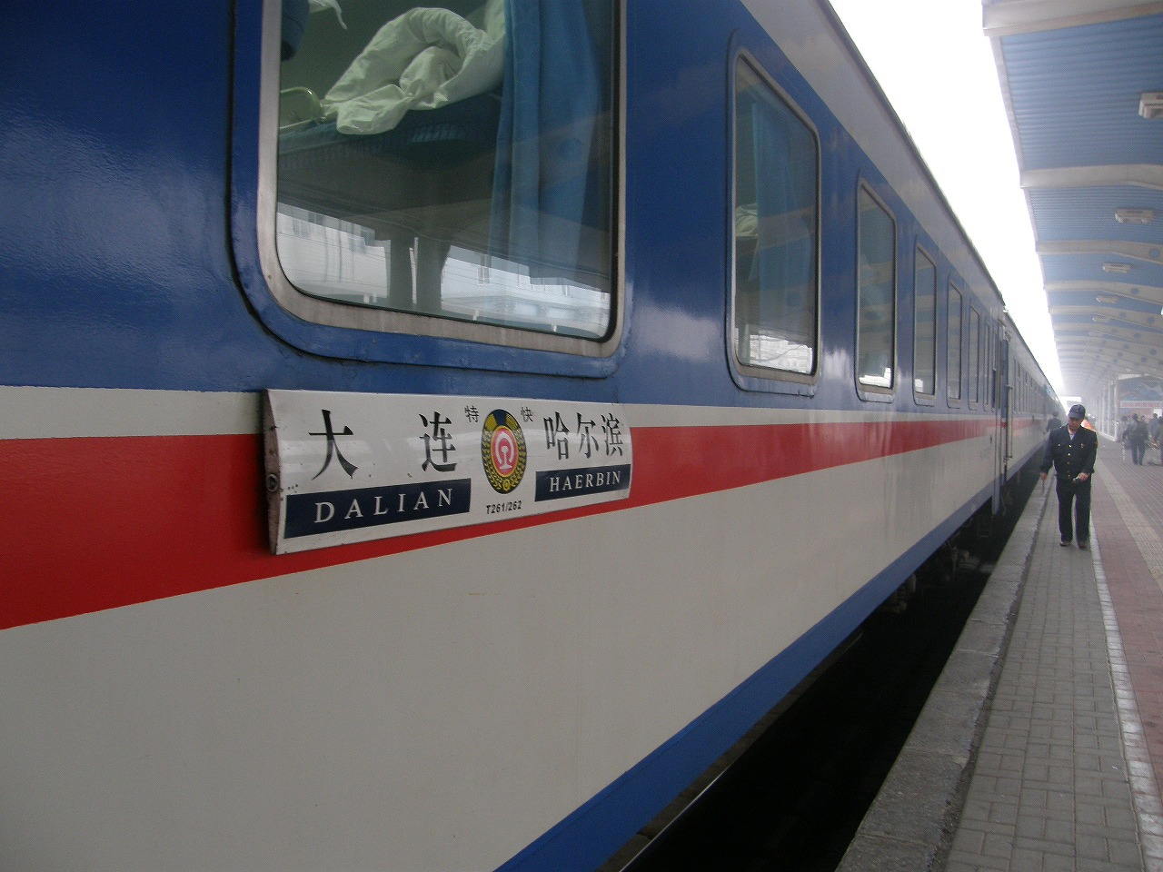 T261/262大連－哈尔滨